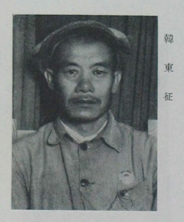 中國人民政治協商會議第一屆全體會議代表